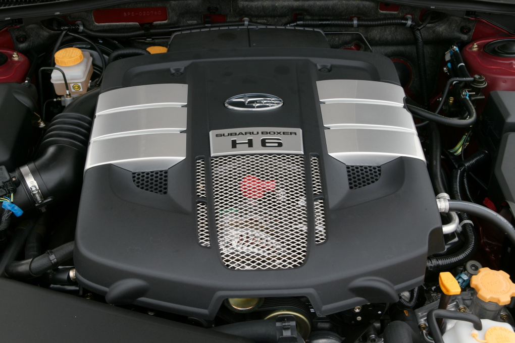 Subaru EZ30 boxer 6 engine.